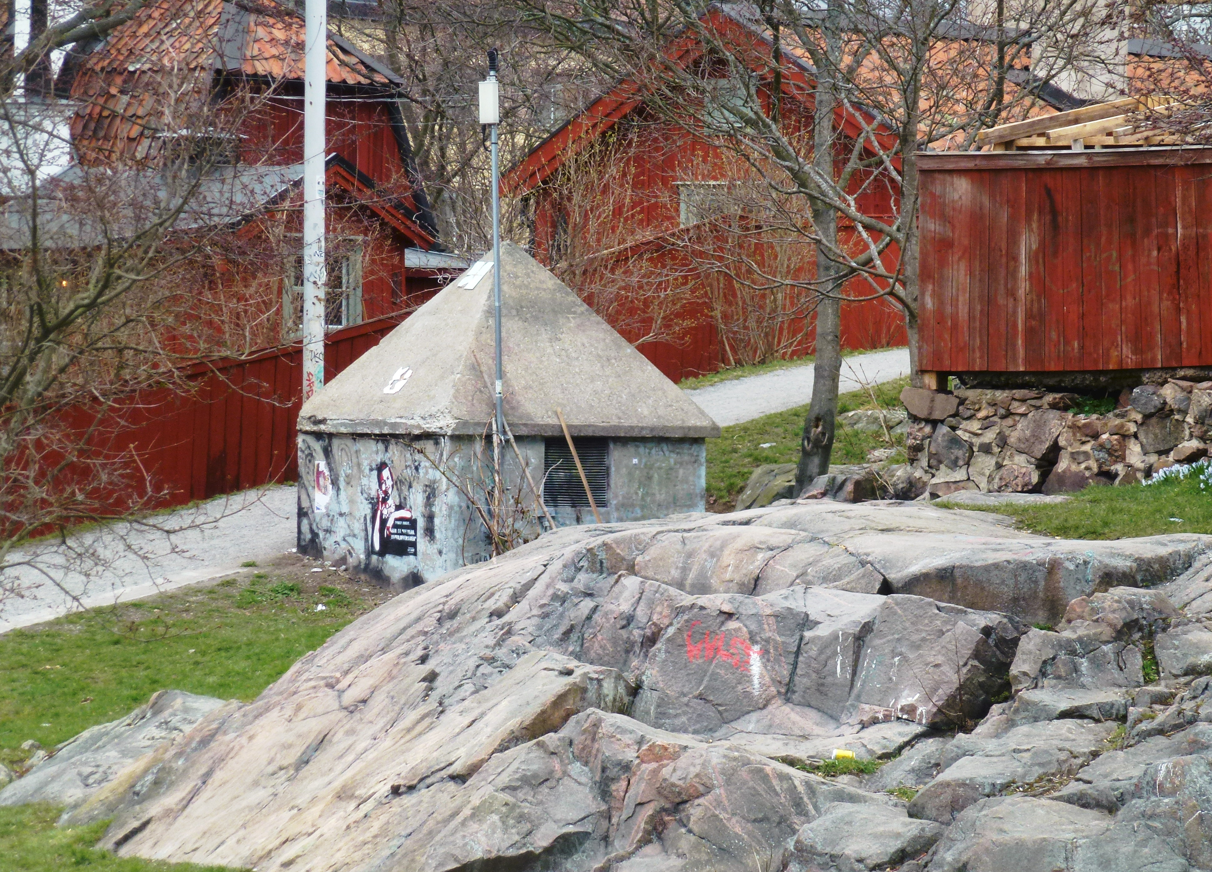 Pionens nödutrymningsväg på berget vid Bergsprängargränd